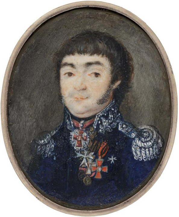 Портрет генерал-майора Алексея Петровича Орлова. Кость, акварель, гуашь. 5,0 х 4,4 см, овал. Музей-усадьба Останкино, инвентарный № Р-347